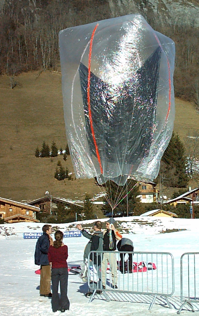 Ballon solaire Praz sur Arly Haute savoie France gonflé par Stephane Rousson